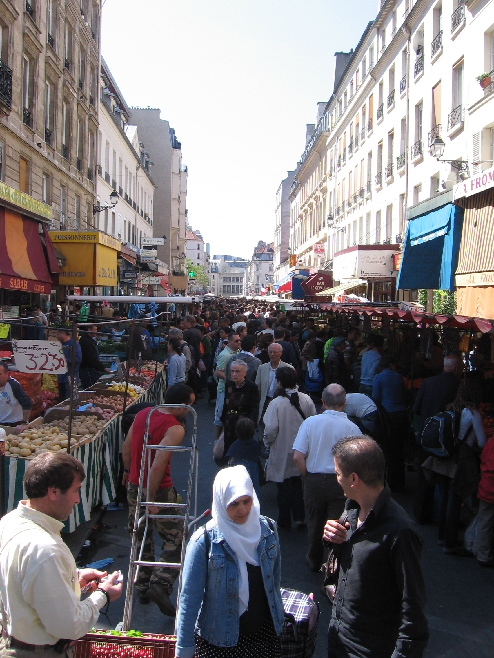 Le marché d'Aligre est un marché "public" situé sur la rue d'Aligre et la place d'Aligre, Paris